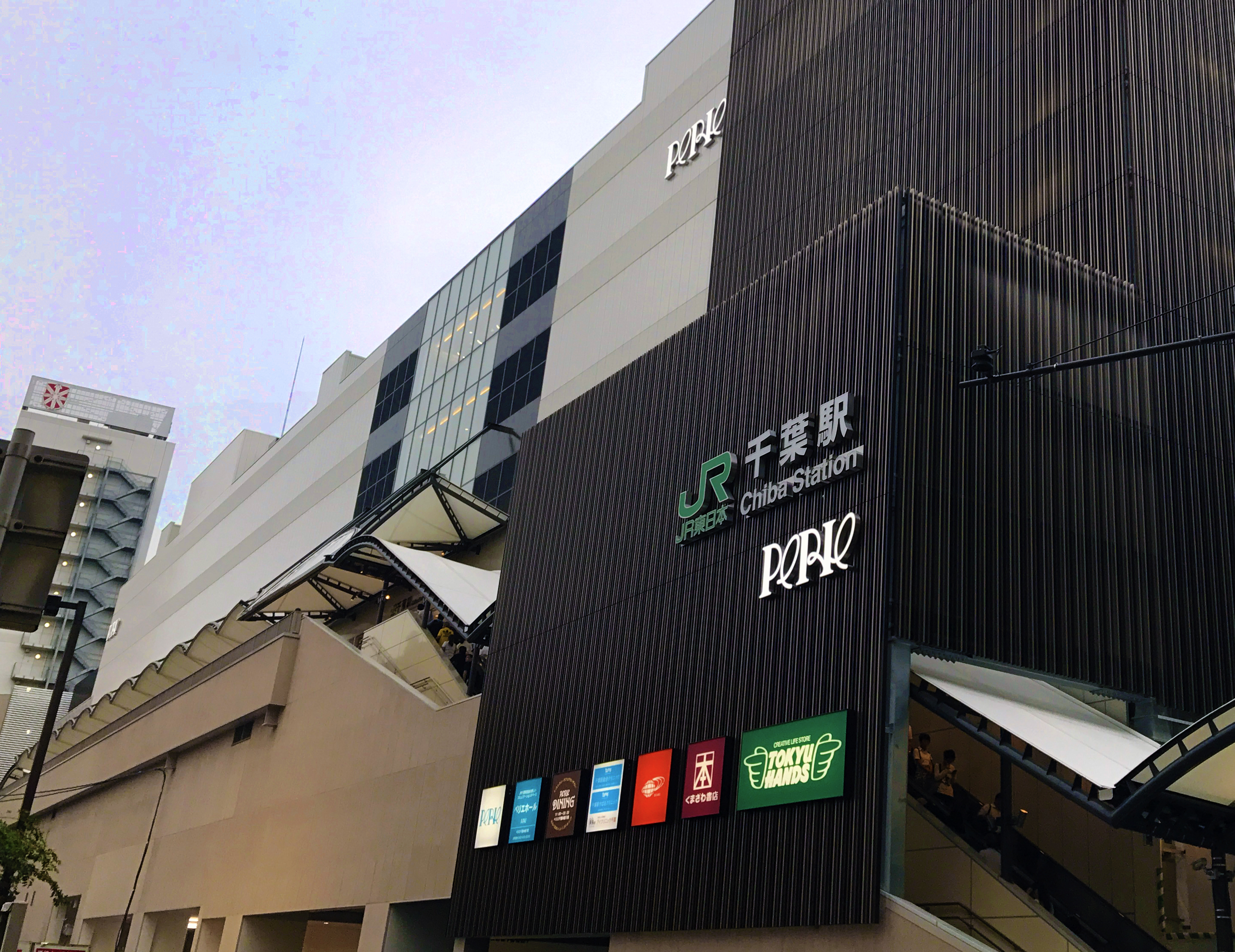 千葉駅南口側